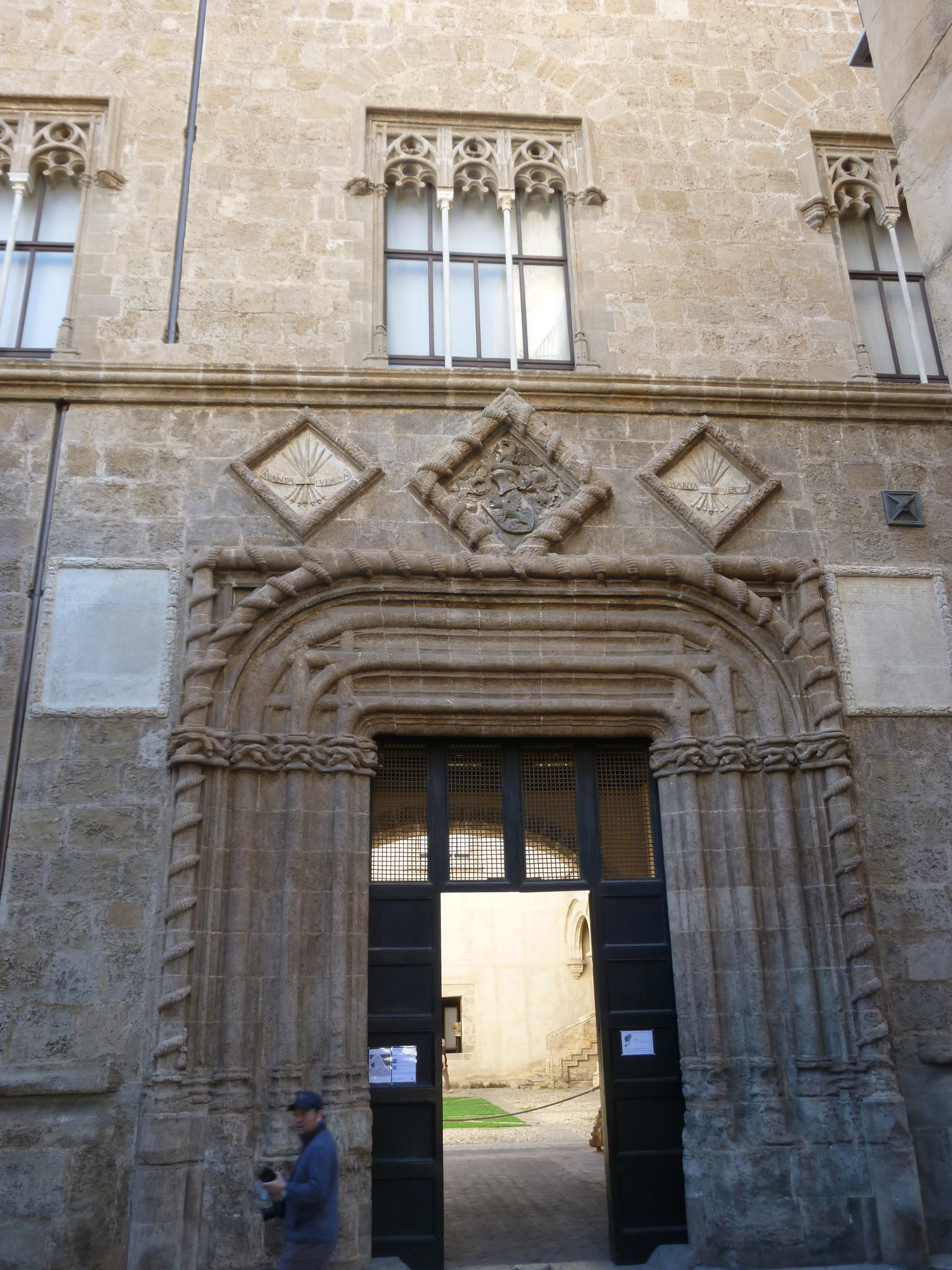 Palermo